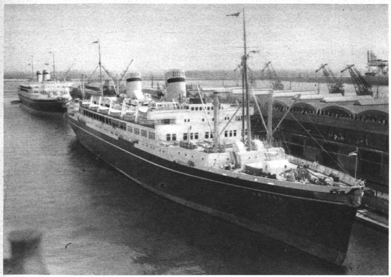 MS "Batory" i MS "Piłsudski" zacumowane przy Dworcu Morskim w Gdyni.